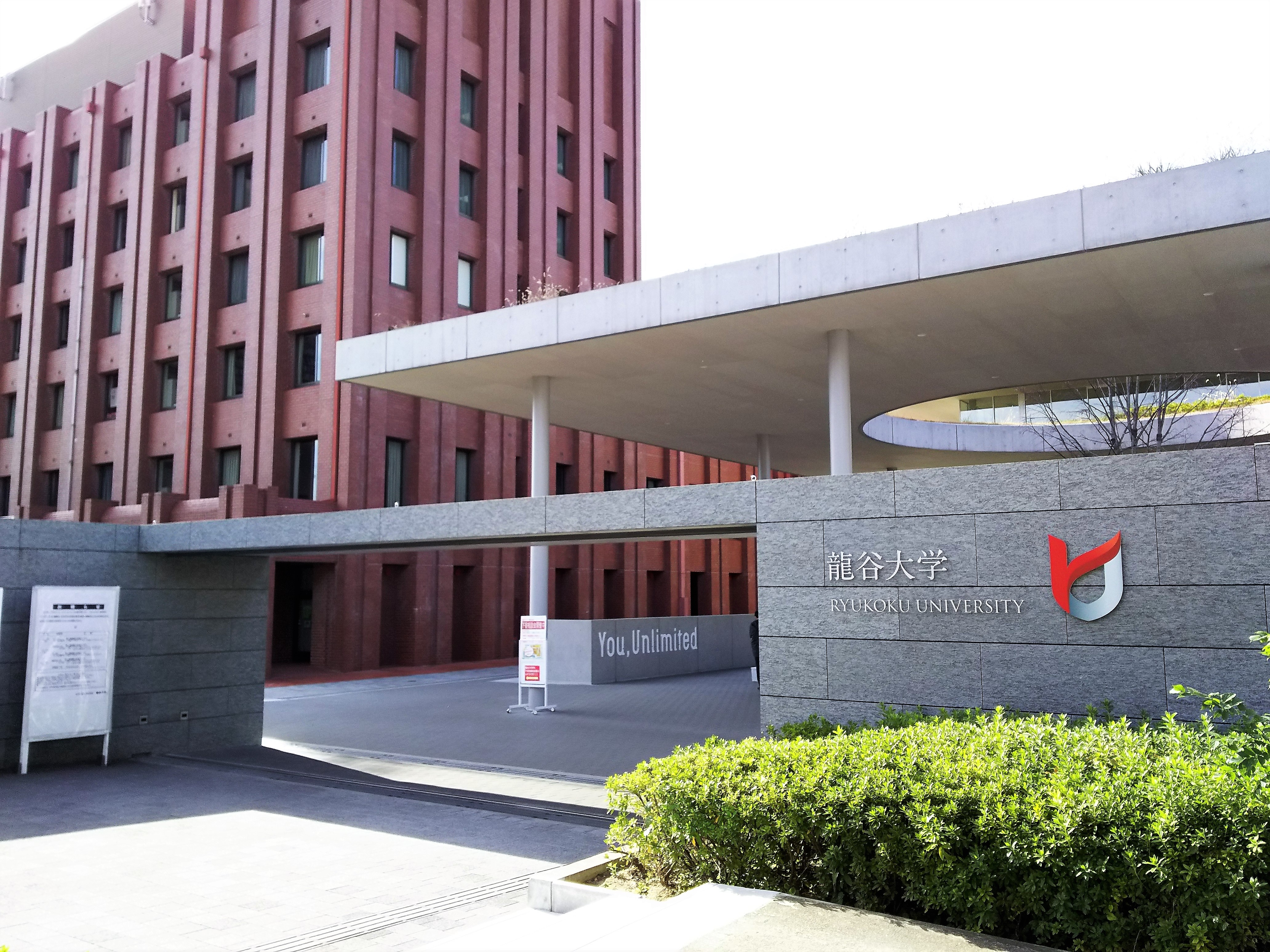 龍谷大学深草キャンパス 西門（京都市伏見区）